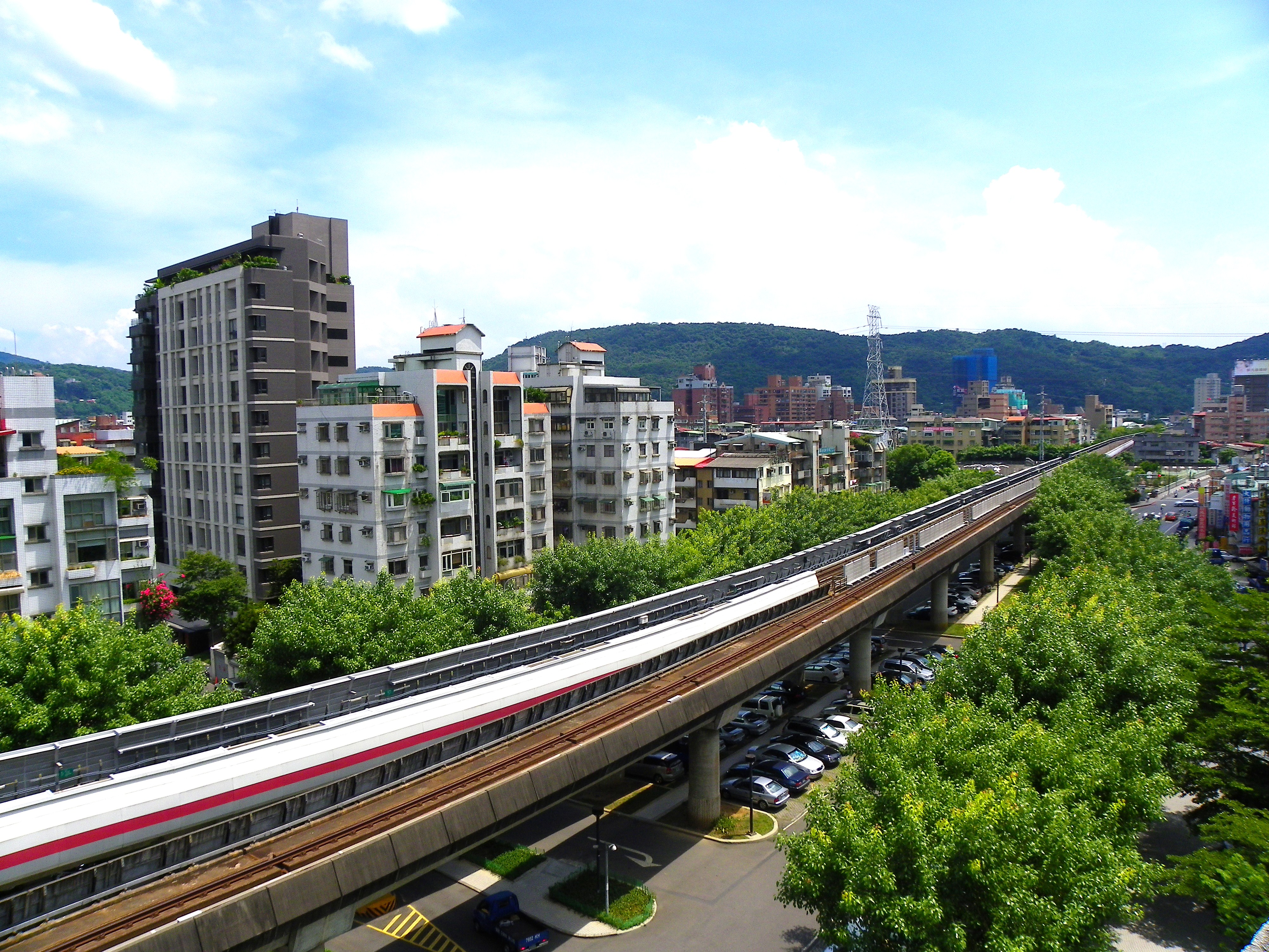 台北捷運淡水線、士林駅～芝山駅間。